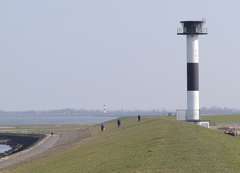 Bilder aus Cuxhaven